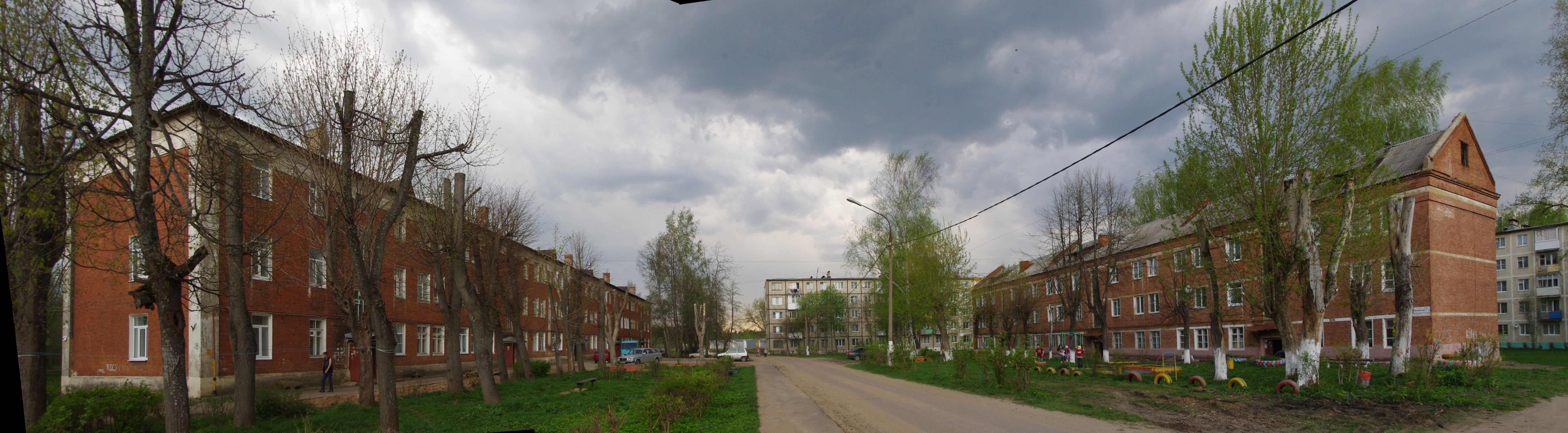 Высоковск. Visokovsk, moscow region